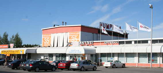 Humppilan Lasitehtaan ostoskeskus